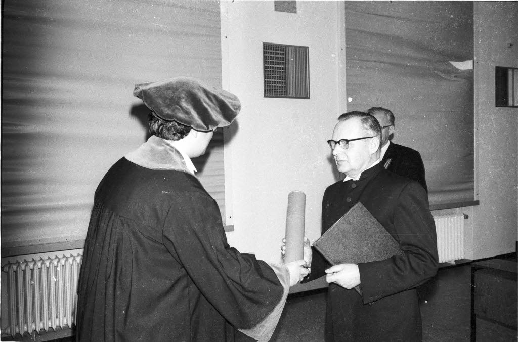 Der Theologe wird für seine vielseitige Arbeit geehrt. Rechts der Dekan der theologischen Fakultät, Prof. Dr. Heinrich Kraft.